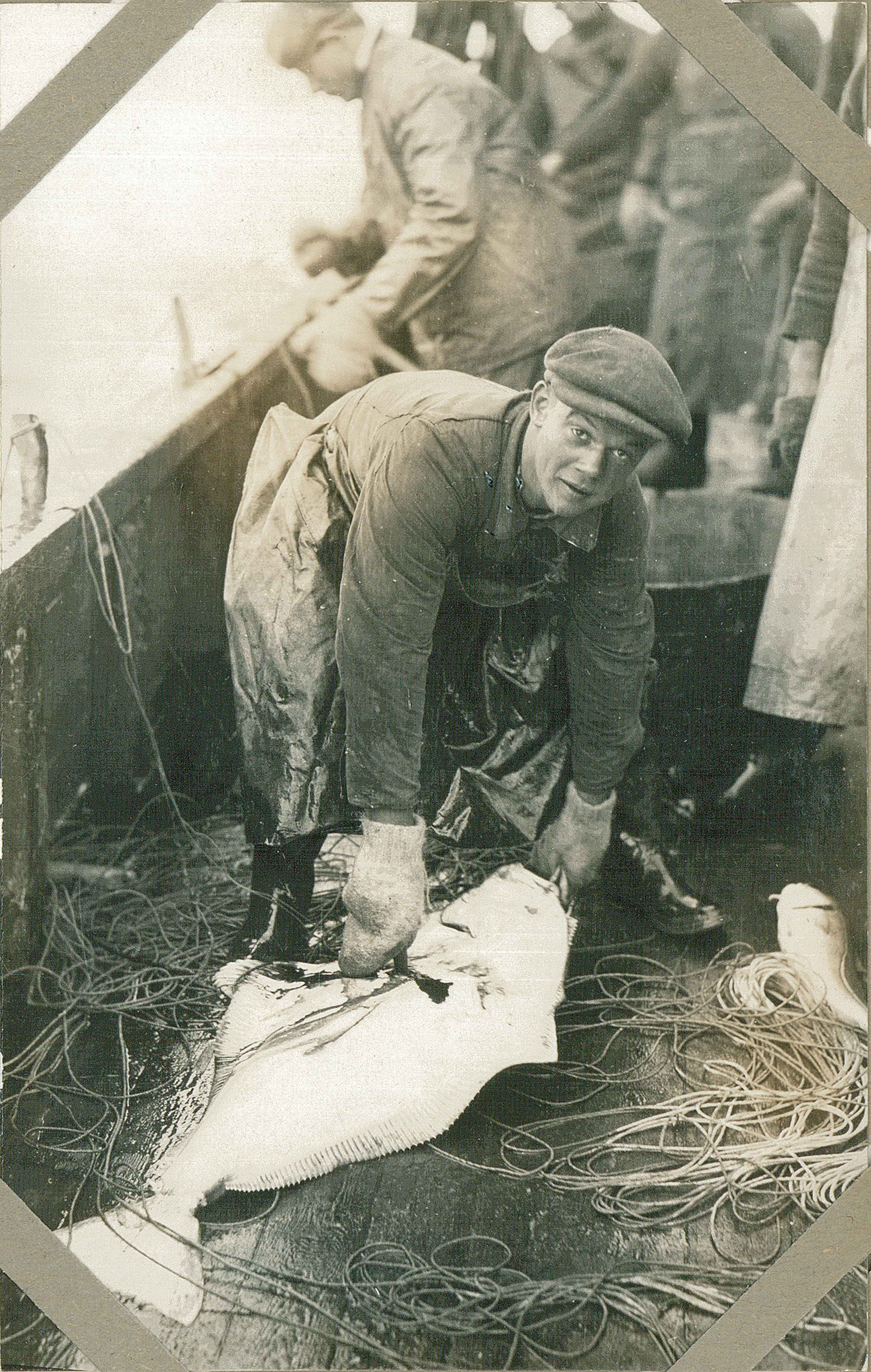 Fotografiet sidder i et fotoalbum lavet af Sophie Petersen med titlen "Færøerne". Fotoalbummet har nummer F5, og indgår i Det Kongelige Danske Geografiske Selskabs arkiv som af resultat af samarbejde mellem Etnografisk Samling og selskabet siden 2010 har været opstillet på Nationalmuseet som et selvstændigt arkiv. Arkivet er administreret af Etnografisk Samling. Det Kongelige Danske Geografiske Selskab har eksisteret siden det blev grundlagt 18. november 1876. Dets formål var at medvirke til “så vel at fremme kendskabet til jorden og dens beboere som at udbrede interessen for den geografiske videnskab” I arkivet findes blandt andet breve, dagbøger, regnskaber, kort og foredragsmanuskripter. Derudover indeholder arkivet over 70.000 fotografier.